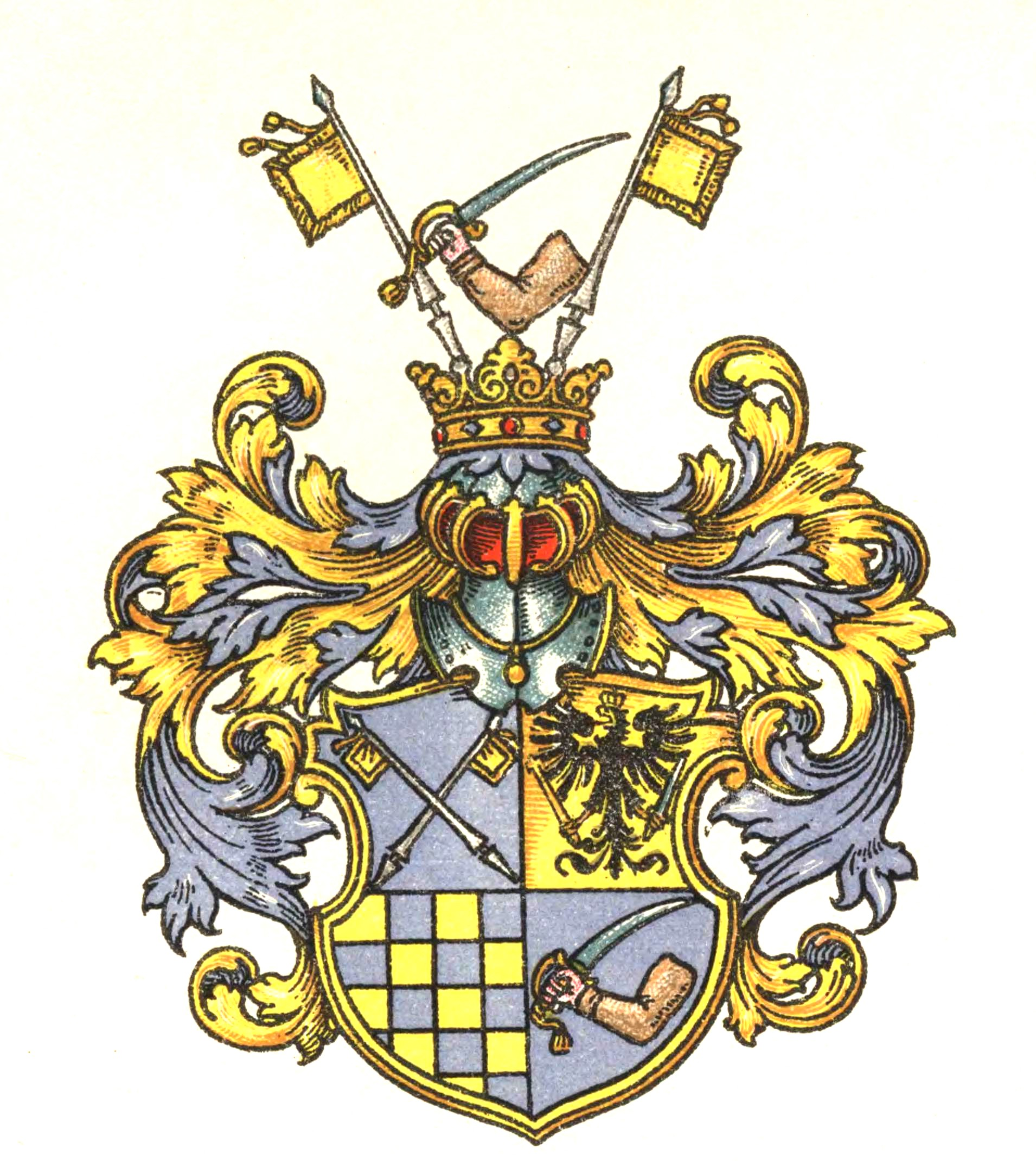 Wappen der Familie von Groeling